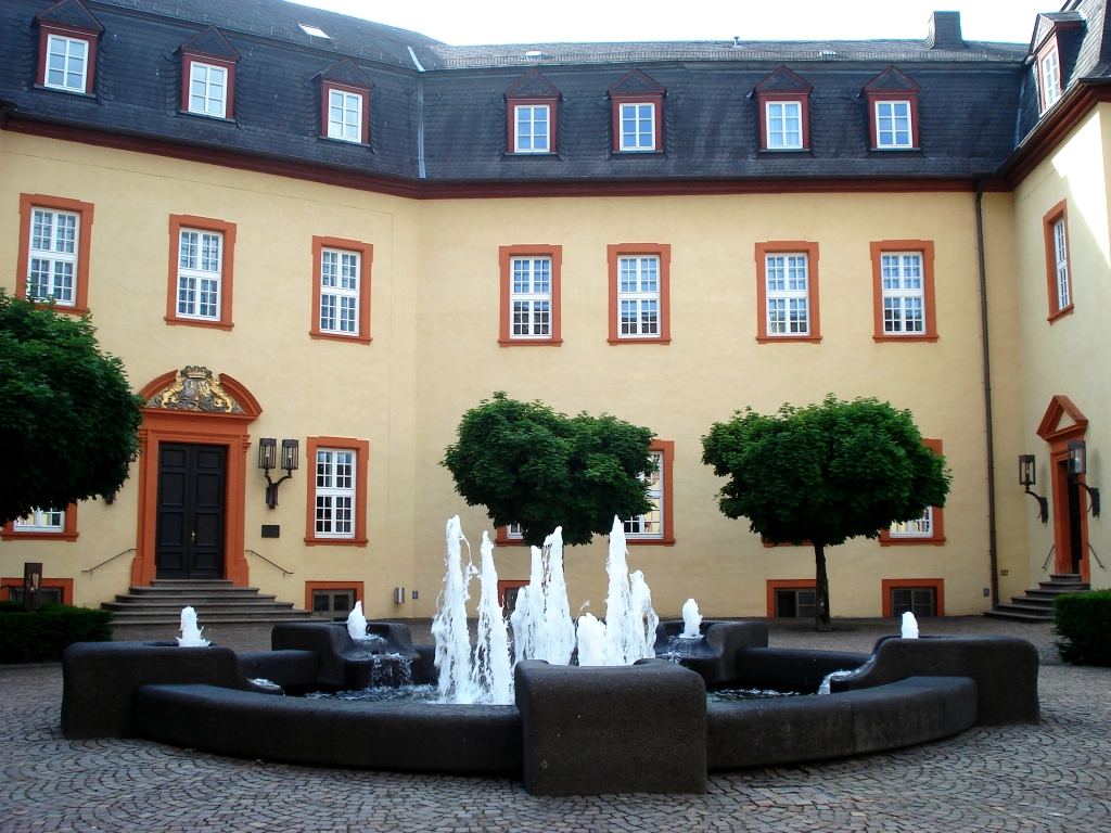 Schloss Innenperspektive